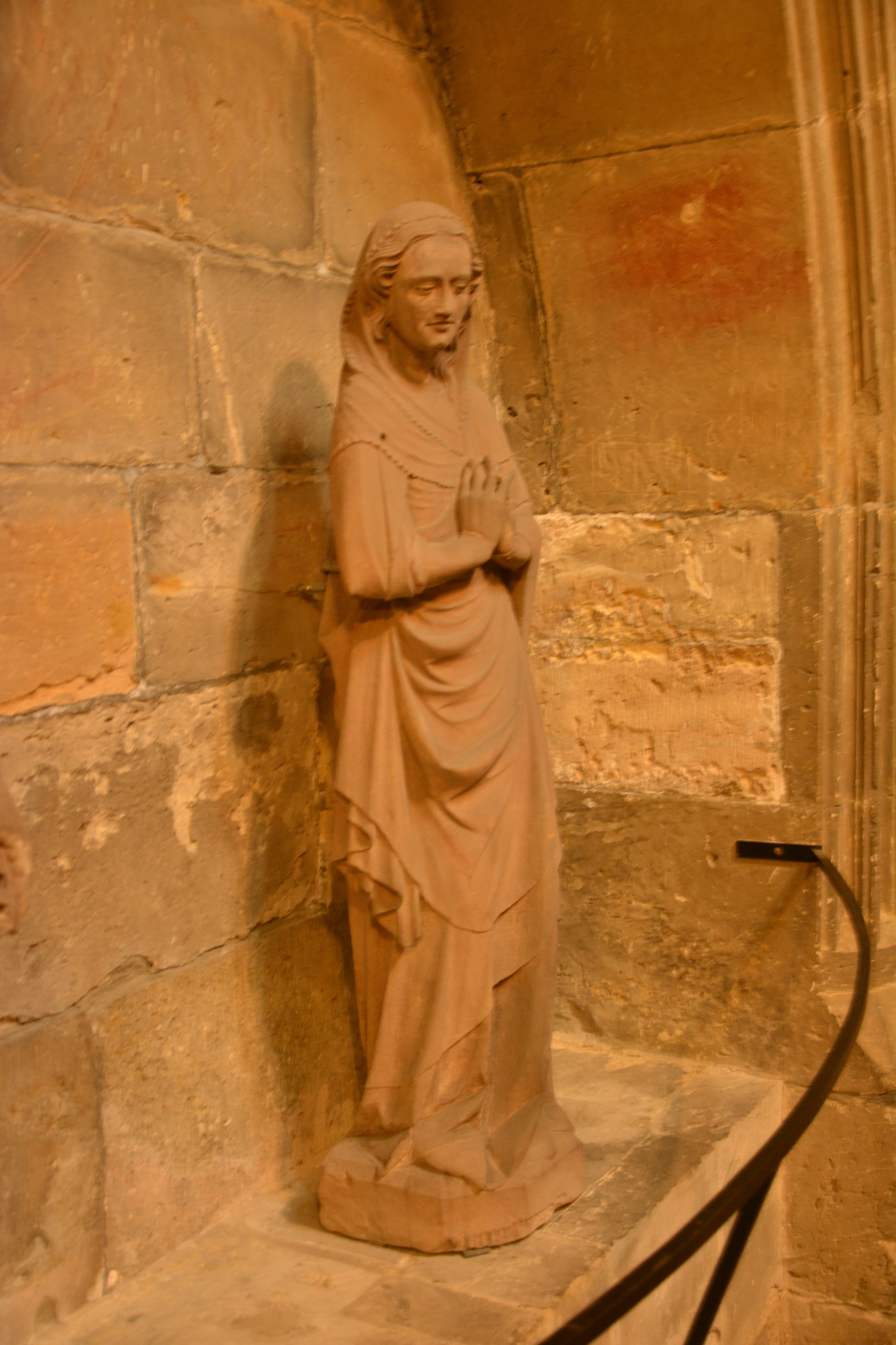 Halberstädter Dom Marienfigur von einem Heiligen Grab